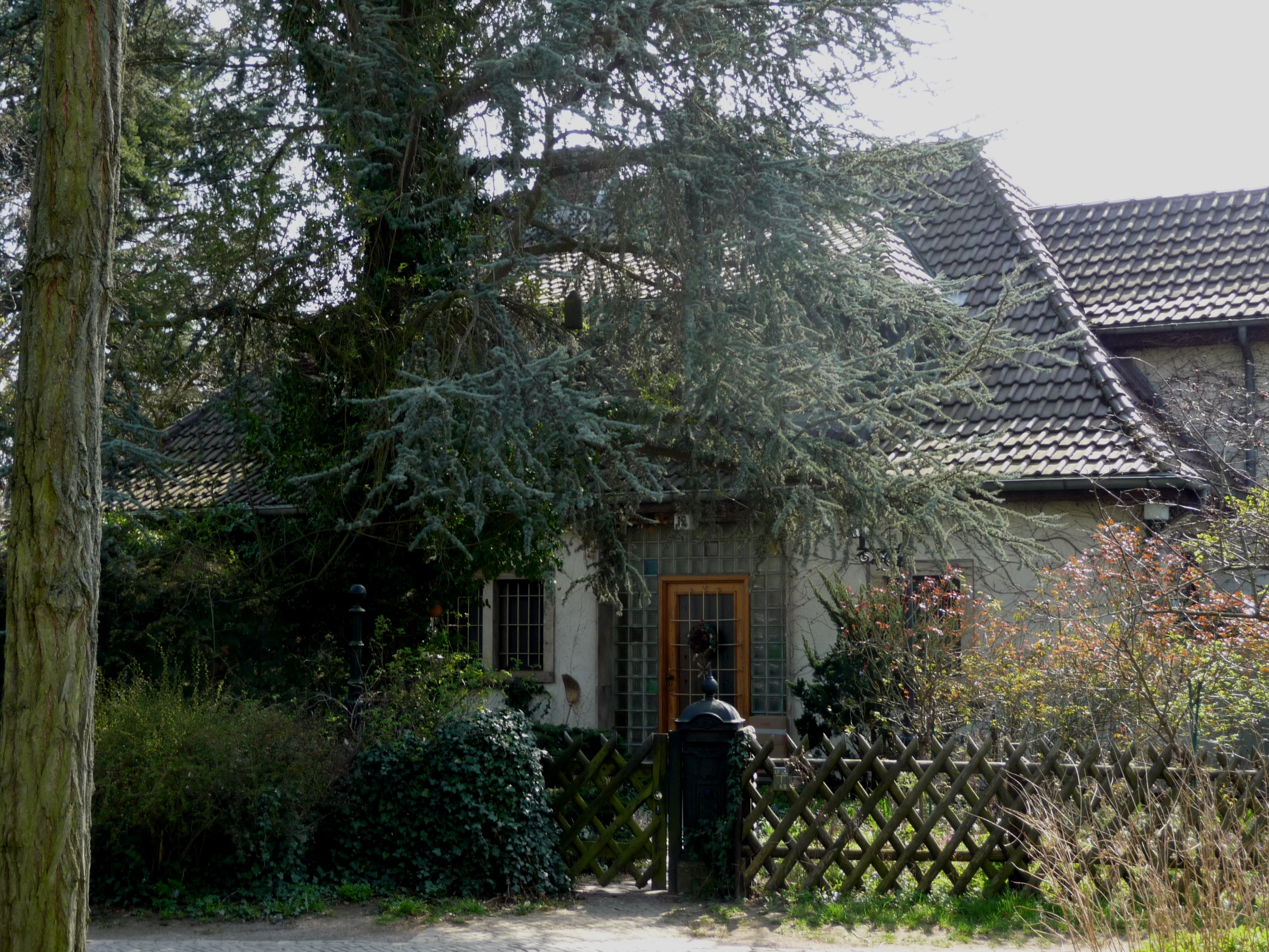 Am Fichtenberg 12, 12165 Berlin, Wohnhaus der Familie Schumann in der Fernsehserie „Ich heirate eine Familie“